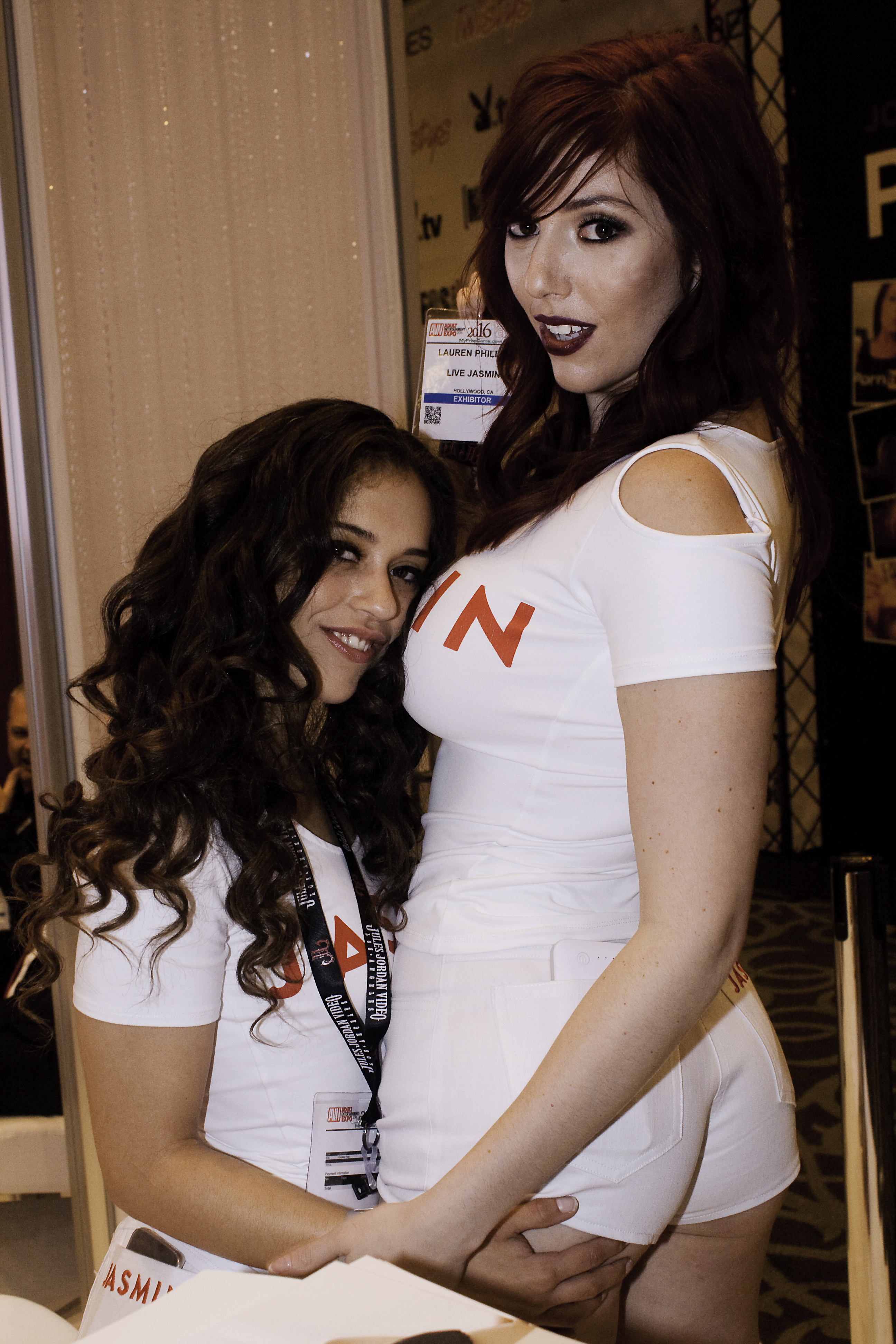 AEE16_0421bas